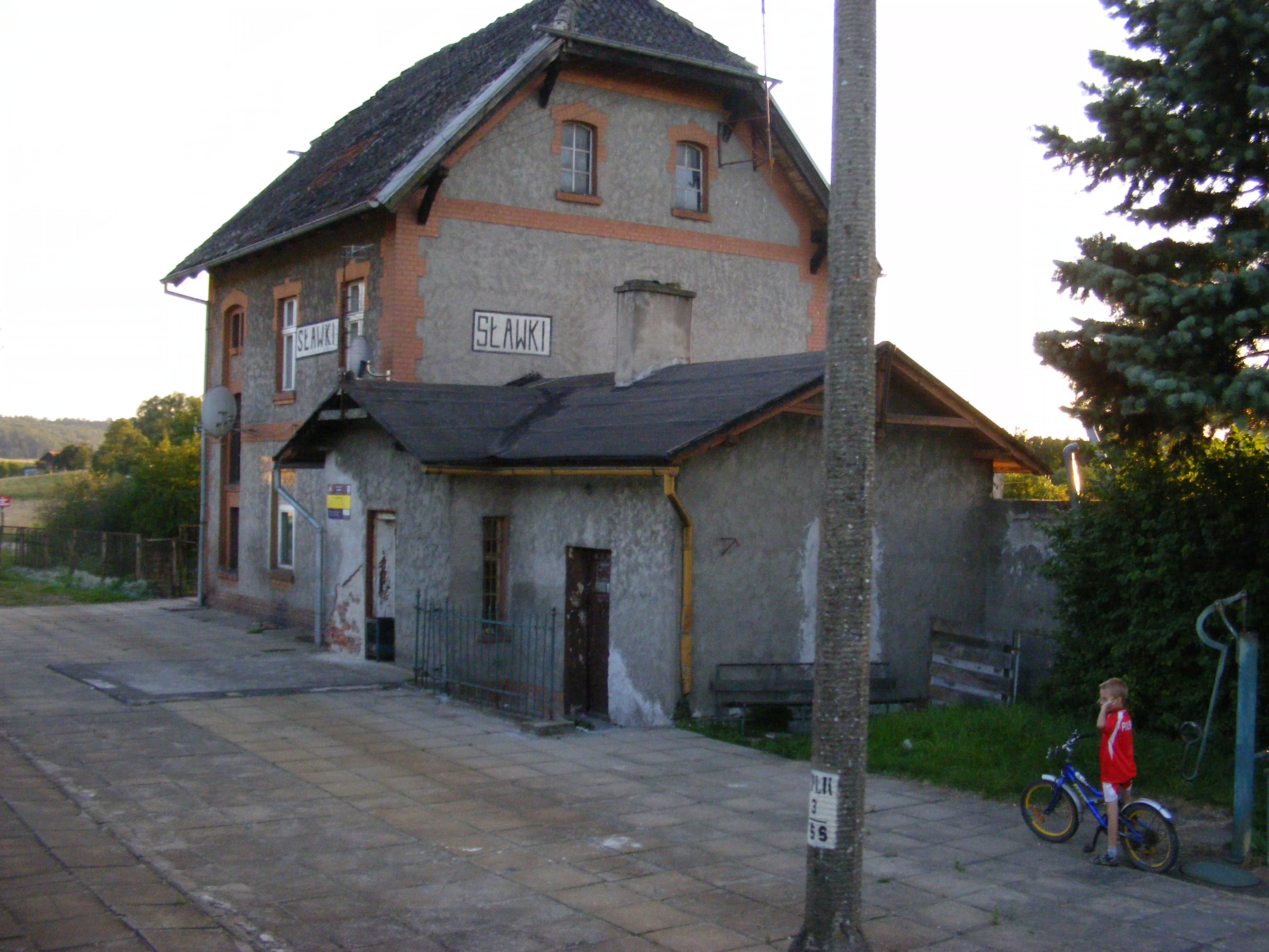 Przystanek kolejowy Sławki (woj. pomorskie)